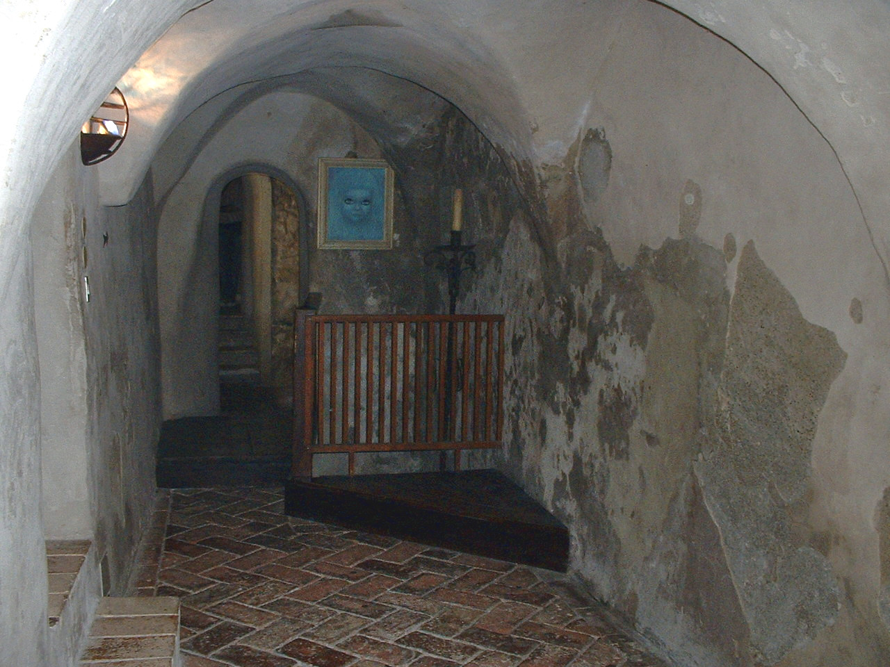 Il corridoio del castello di Montebello, presunta dimora del fantasma di Azzurina, dove vengono fatte ascoltare le registrazioni attribuite al fantasma